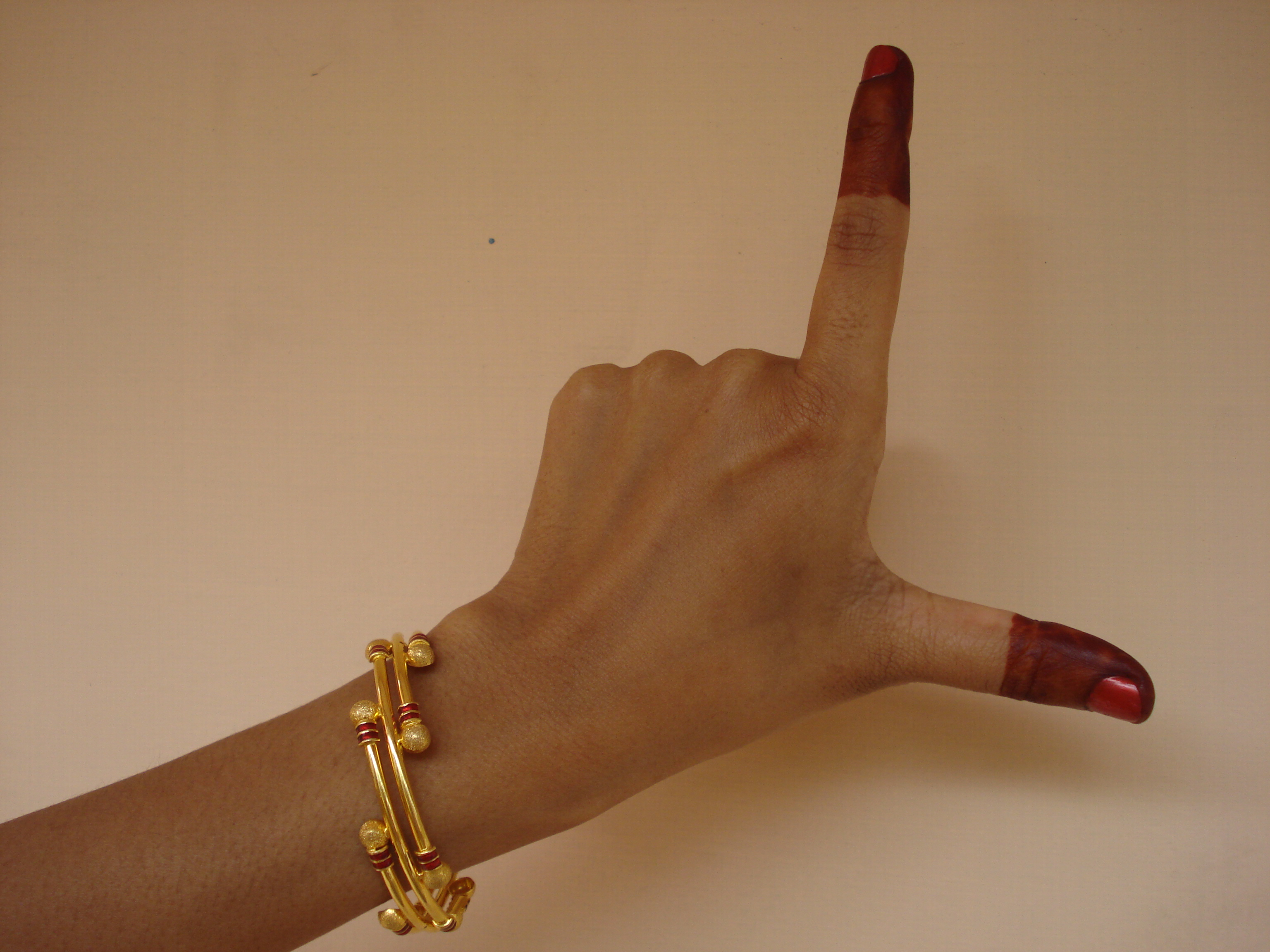 ചന്ദ്രകലാ ഹസ്തം